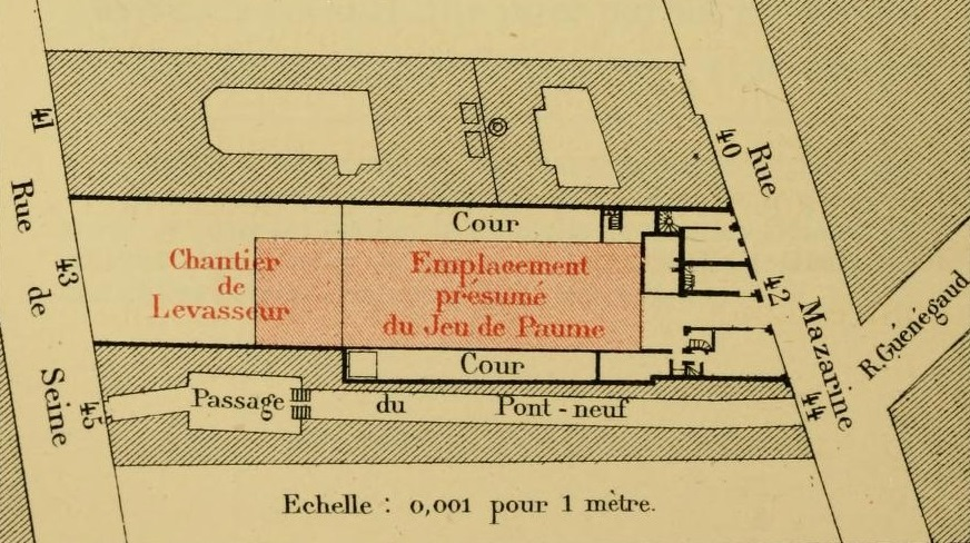 "Ancien état des constructions d'après les plans de M. Barbier et le plan Vasserot".